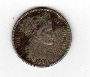 1 peso colombiano p/m de 1914 - Reverso